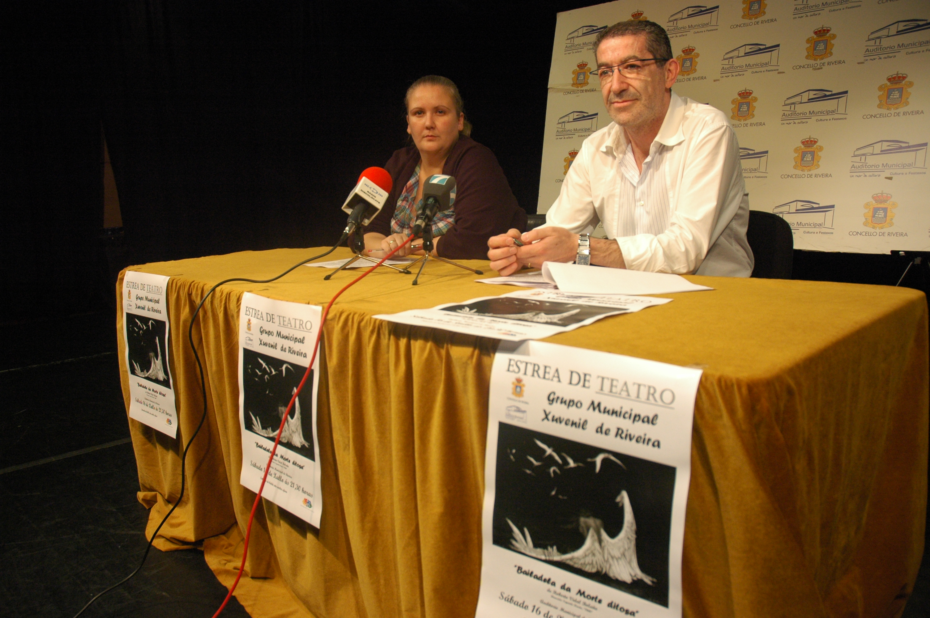 Posted via email from